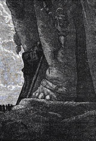 Illustration du roman Les Misérables. Quatrième partie - Livre 6 - Chapitre II : Où le petit Gavroche tire partie de Napoléon le Grand.